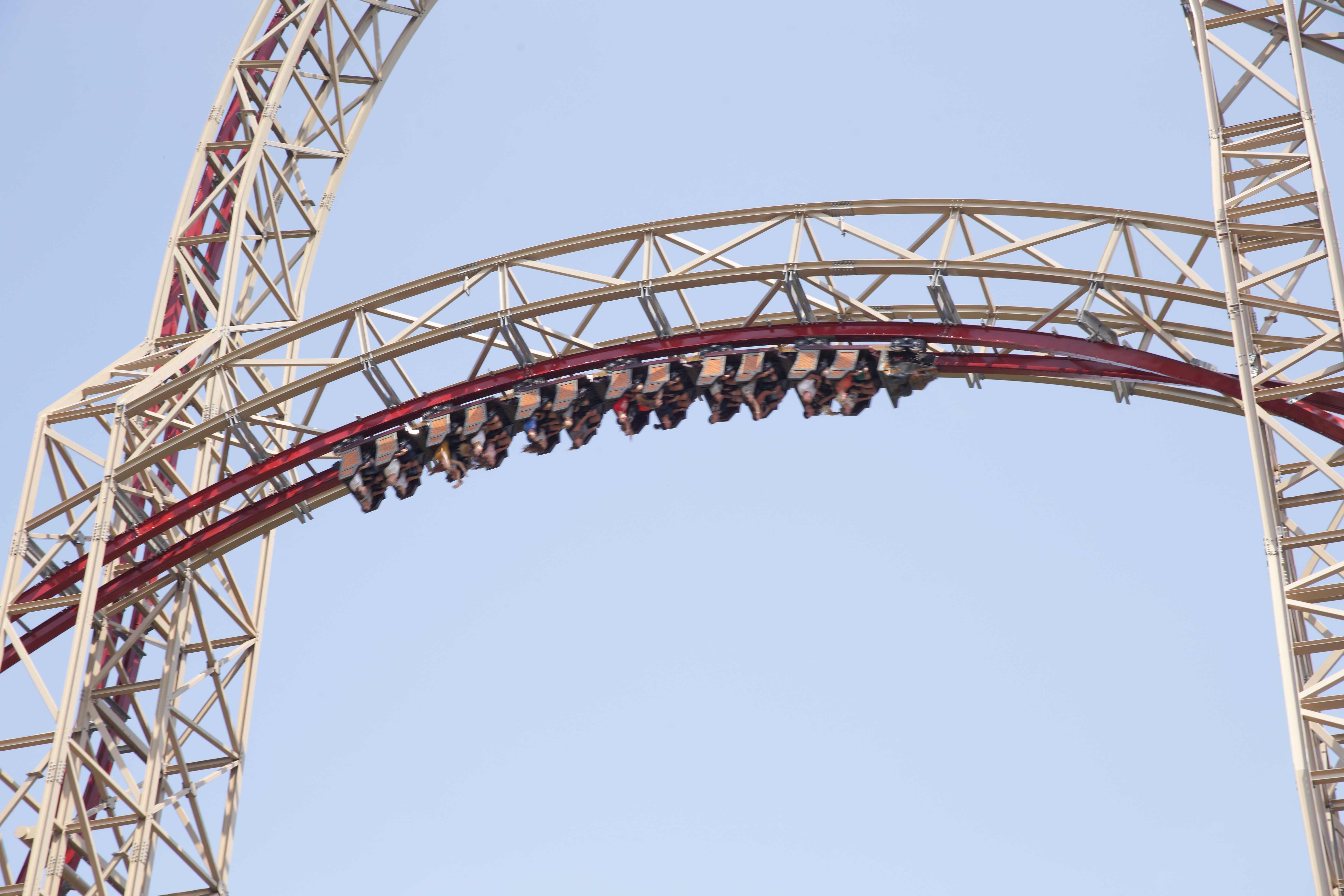 Zero-g-stall - pierwsza inwersja na hybrydowej kolejce górskiej Zadra w parku Energylandia w Polsce.